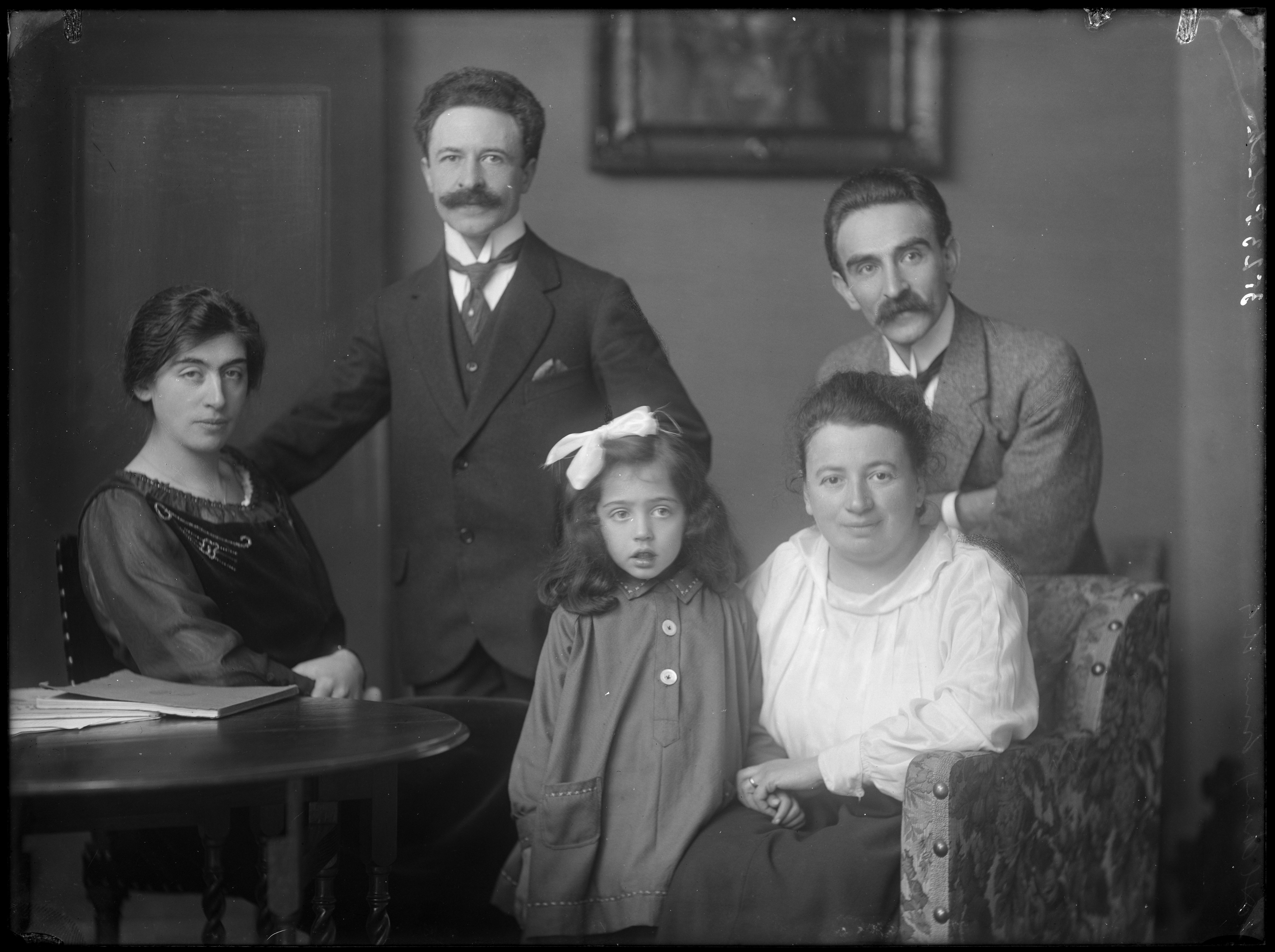 Administratie Merkelbach: Polak Op deze foto: Gesine van Gelder, Hannah (Hans) Polak, Henriëtte Antoinetta Schwarz, Leonard (Leo) Polak, Wilhelm (Willy) Polak Jaartal(len): 1917 Bestandsnaam: 010164018975 Instelling: Stadsarchief Amsterdam